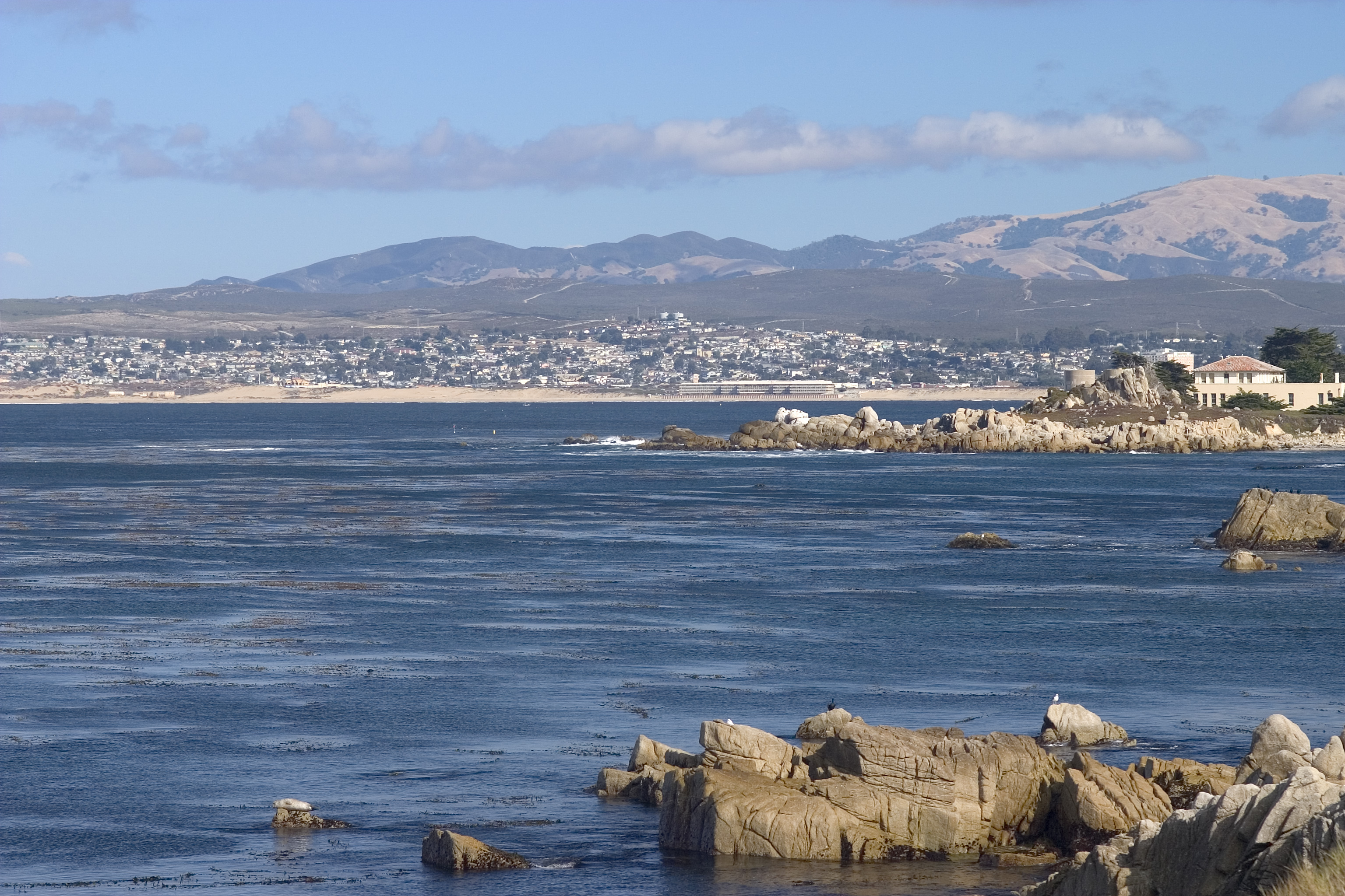 Bahía de Monterey, California